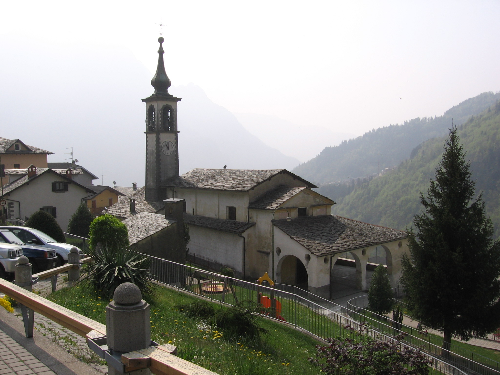 Parrocchia di Santa Maria Assunta, Valgoglio, Bergamo, Italia